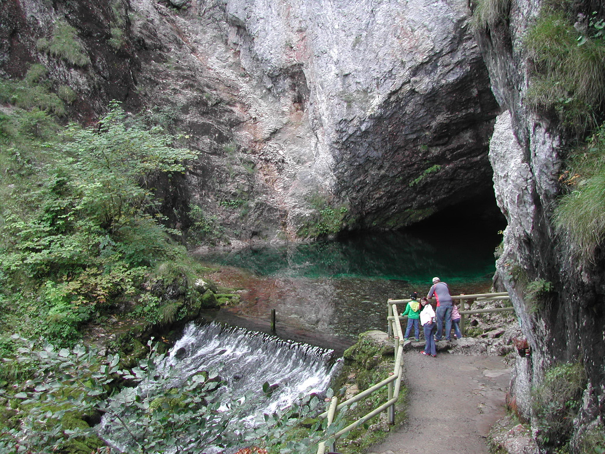 Pießling Ursprung, Oberösterreich. Eine der größten Karstquellen Österreichs This media shows the natural monument in Upper Austria with the ID nd103 (Piesling-Ursprung).